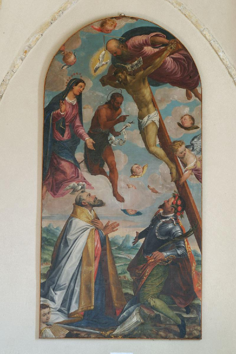 Tipologia dipinto Misure cm 269.0x195.0 (HxL) Datazione secolo XVIII (1784) Autore Quecchi Gaspare, Narvesa Gaspare, bottega friulana Materia e tecnica olio su tela Soggetto Trinità Iscrizioni iscrizione (in basso a sinistra) PERDUTO HAVEA DE GLI OCCHI AMBO L SPLENDORE E ORANDO A SAN SEVERO CON BUON ZELO; LA LVCE AL DESTRO EI M'IM PETRO' DAL CIELO, IO SON VICENZA FIGLIA DEL PITTORE